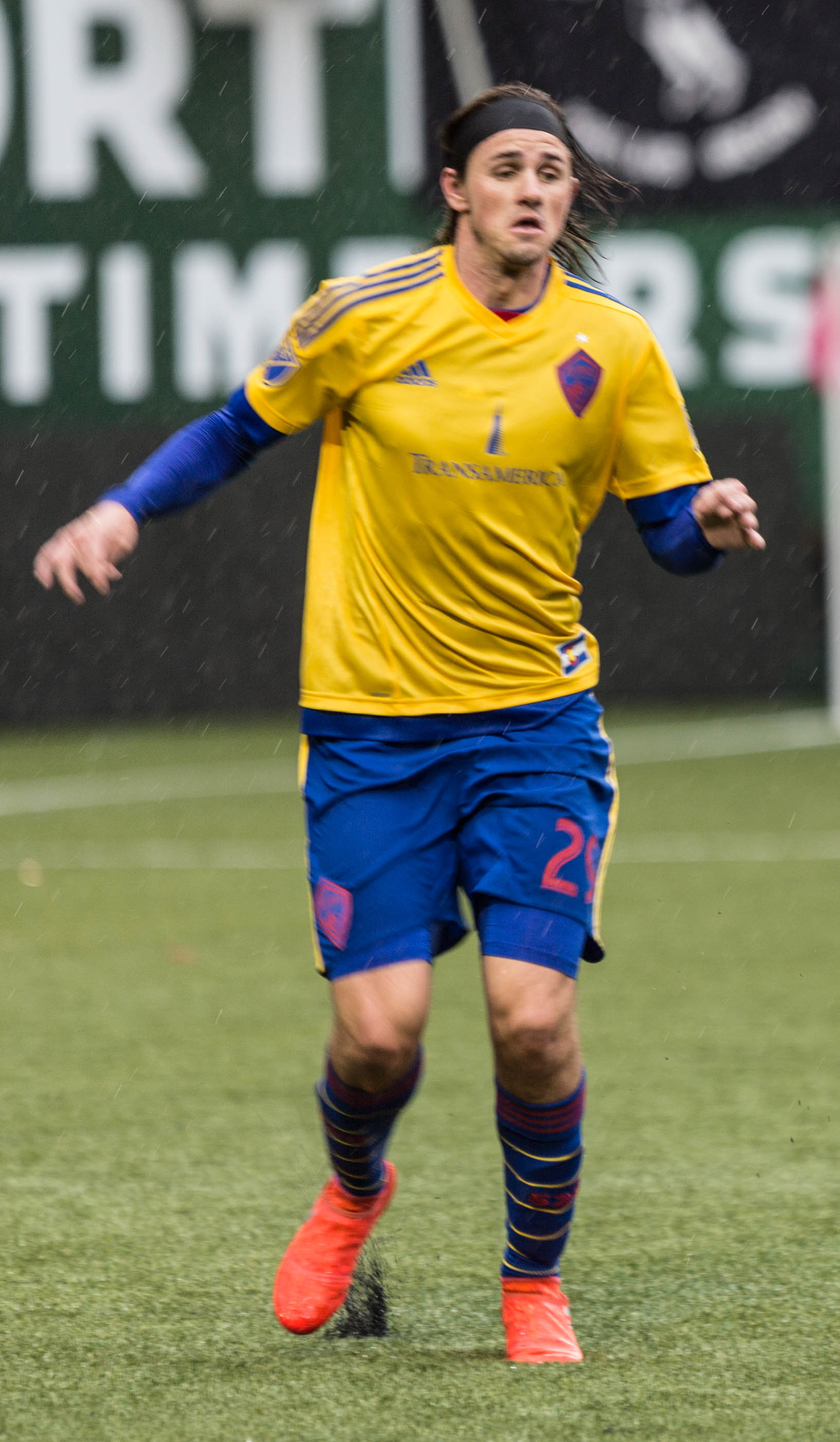 N42A0442.jpg